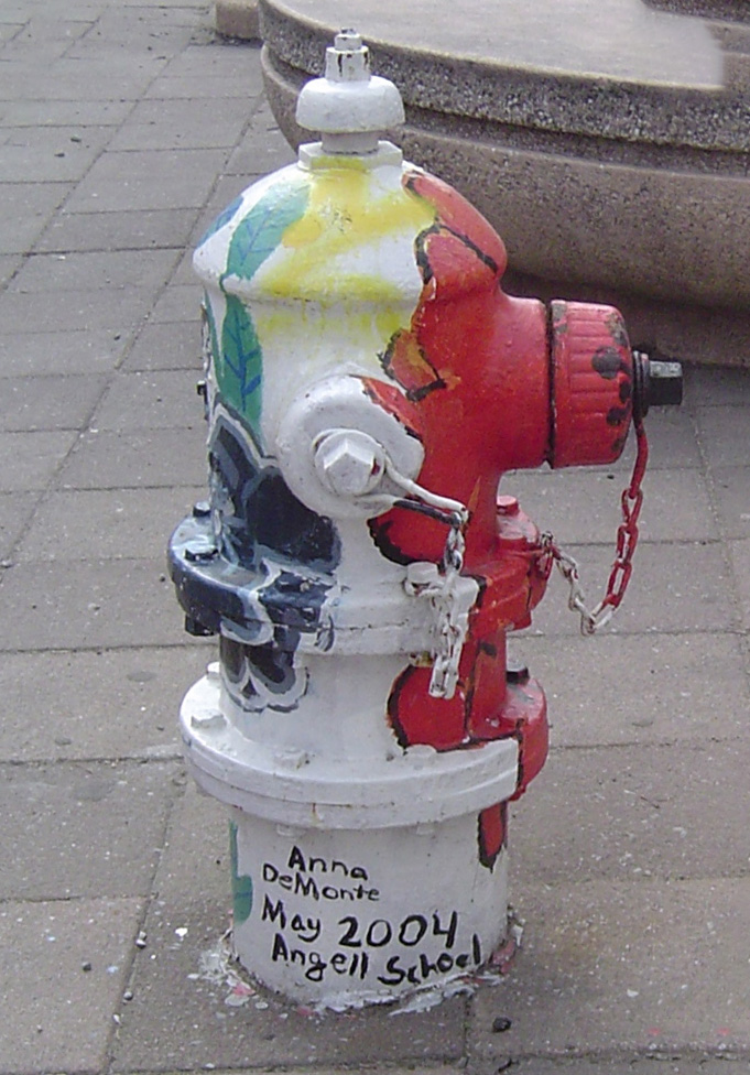 Ann Arbor fire hydrant